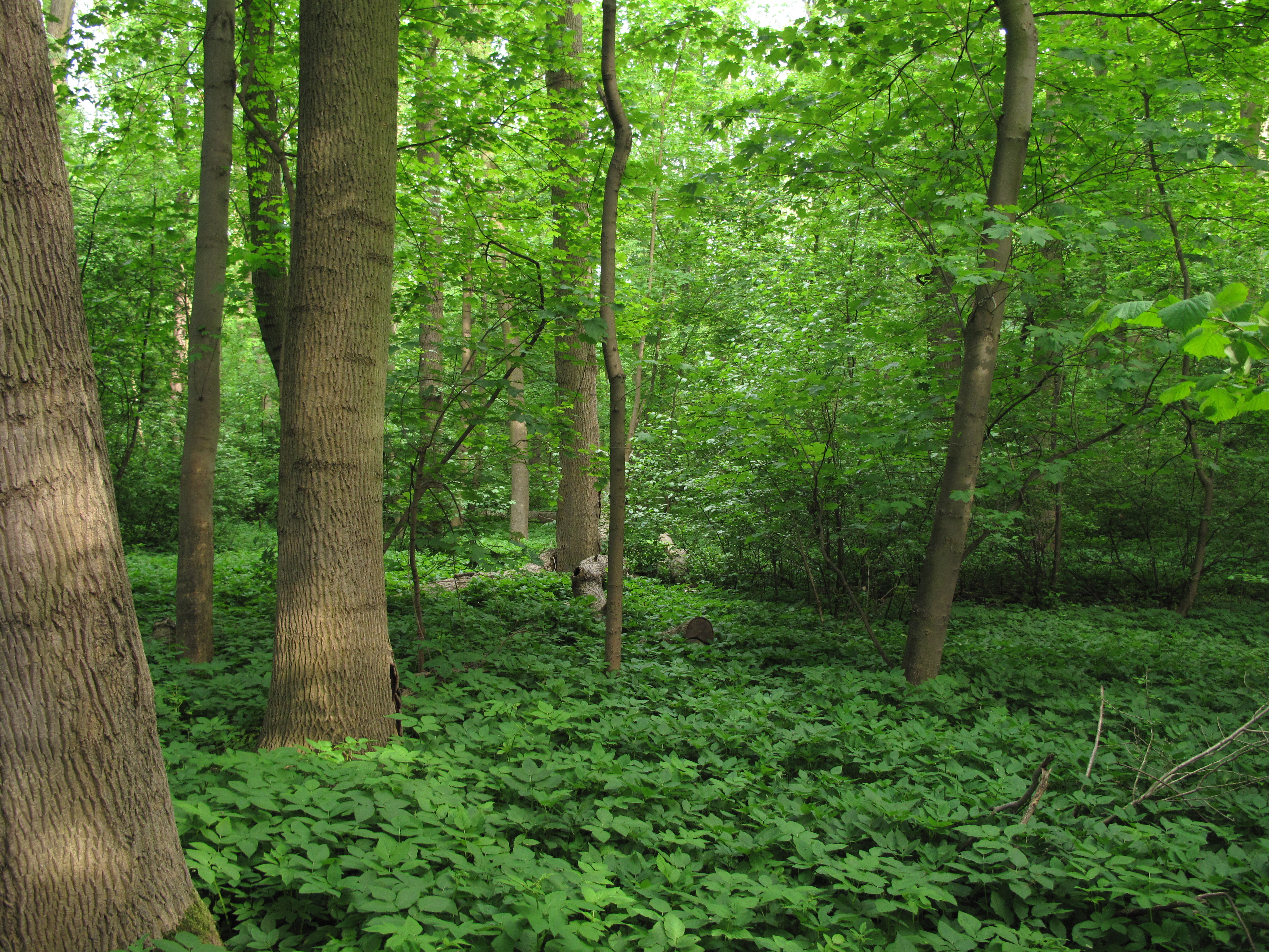 Přírodní rezervace Loužek. Okres Litoměřice, Česká republika.